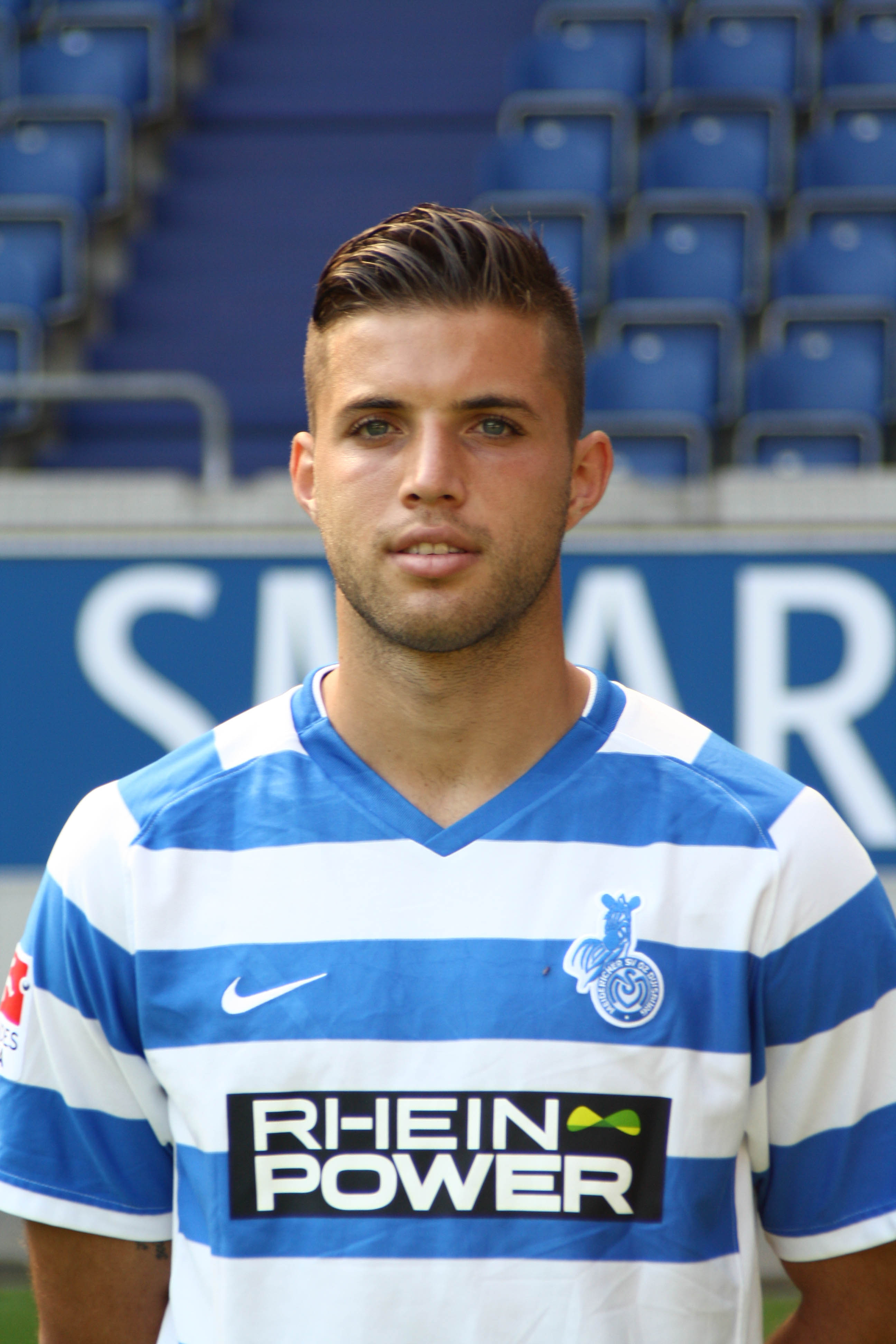 Vasileios Pliatsikas, MSV Duisburg